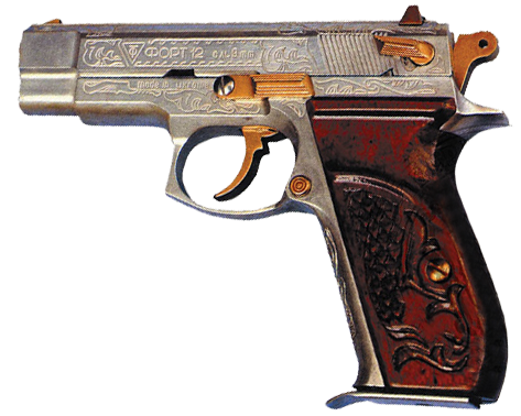 Відзнака МВС України «Вогнепальна зброя (Форт 12)». Введена наказом Міністра МВС України № 180 від 5 червня 2007.